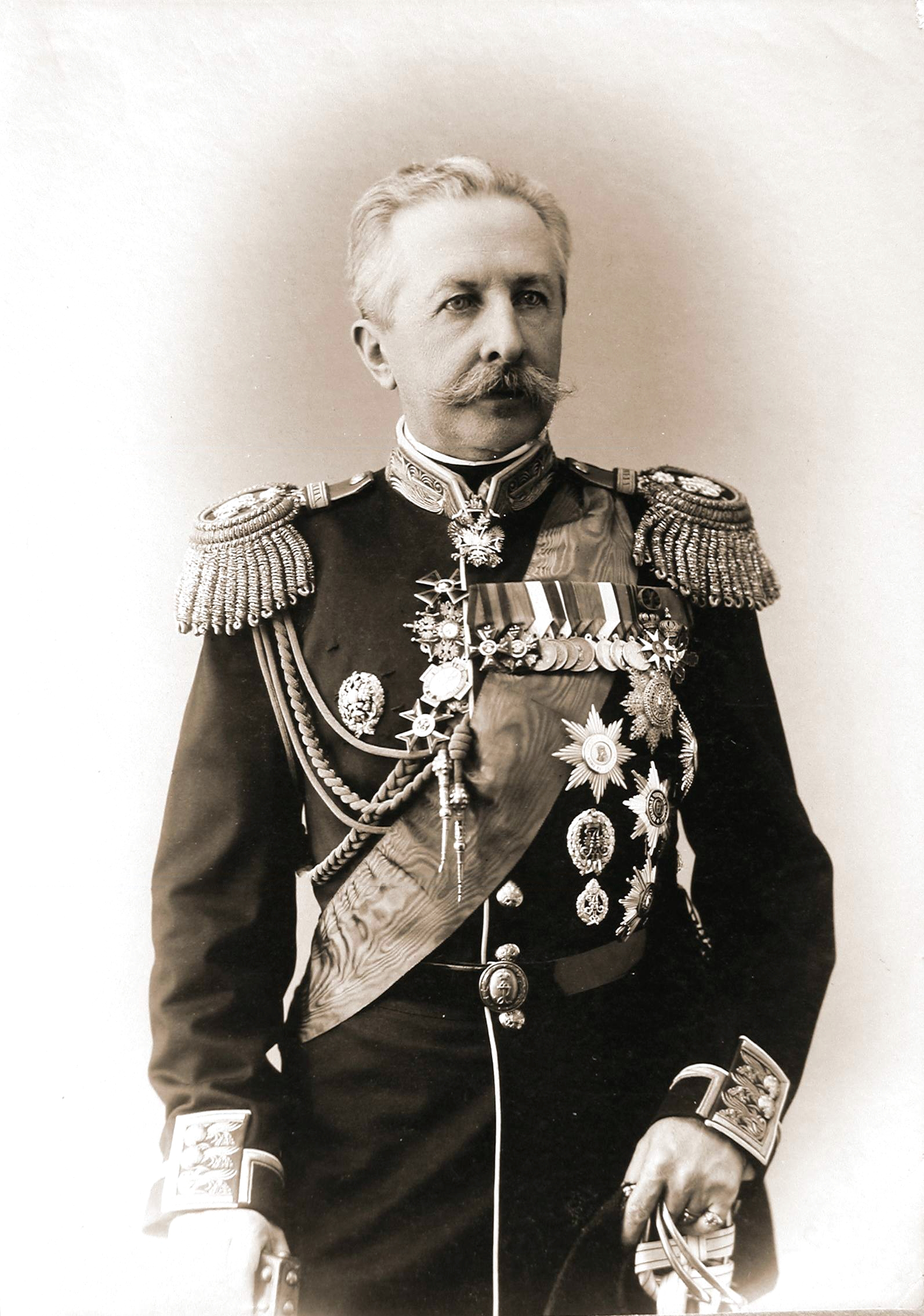 Дми́трий Серге́евич Арсе́ньев (1832—1915) — русский адмирал (1901), Генерал-адъютант (1896), участник Среднеазиатских походов. Внук курляндского губернатора Н. И. Арсеньева.